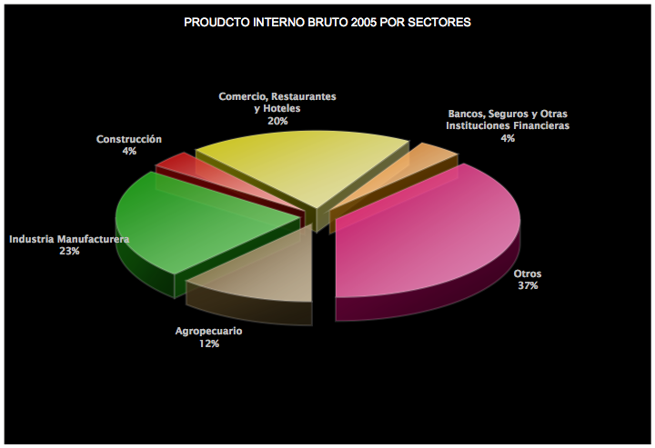 Autor: Andrés Segovia La fuente de la tabla de datos con la cual se ha elaborado el gráfico es el Banco Central de Reserva de El Salvador (sitio web